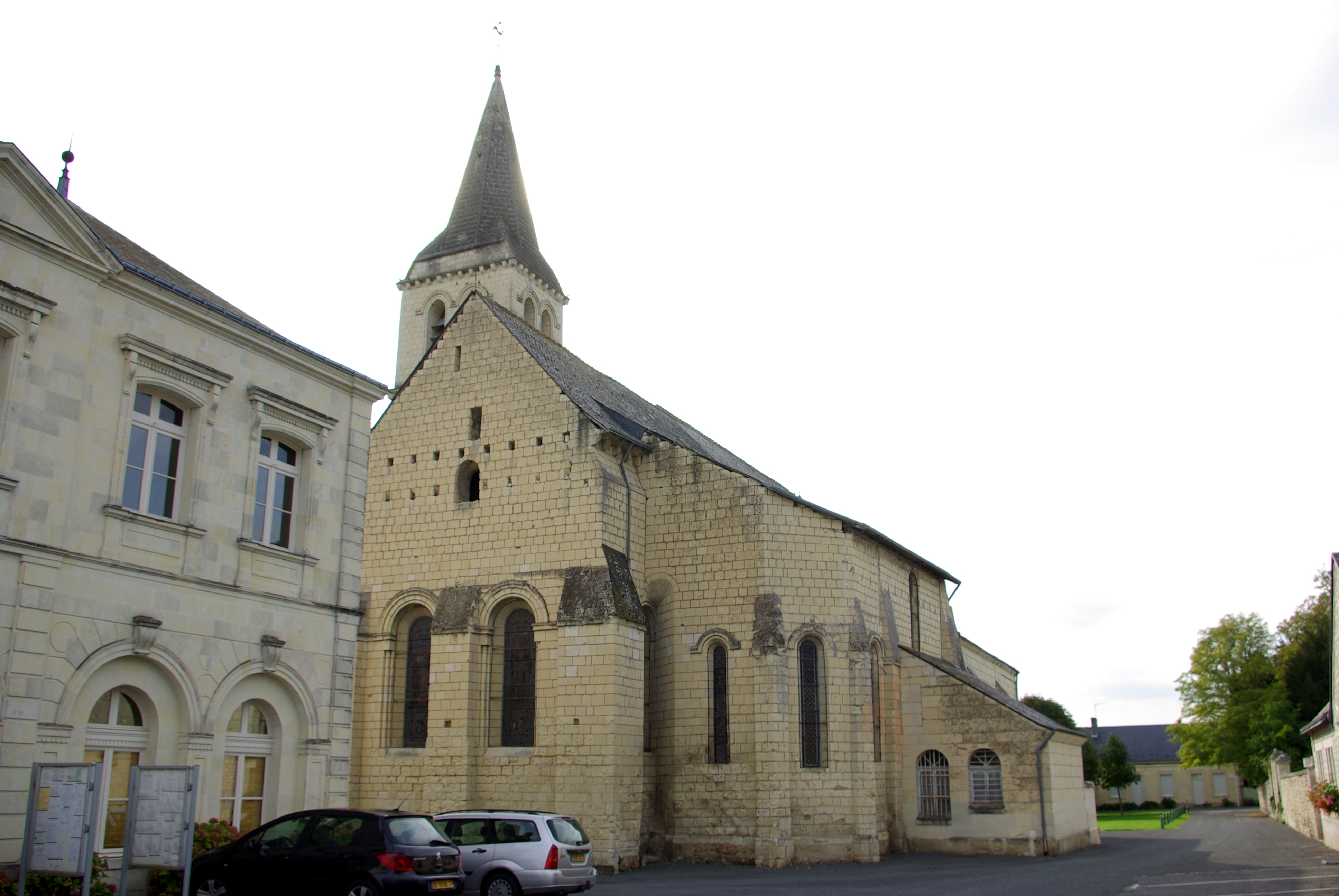 Église Saint-Martin de Restigné.